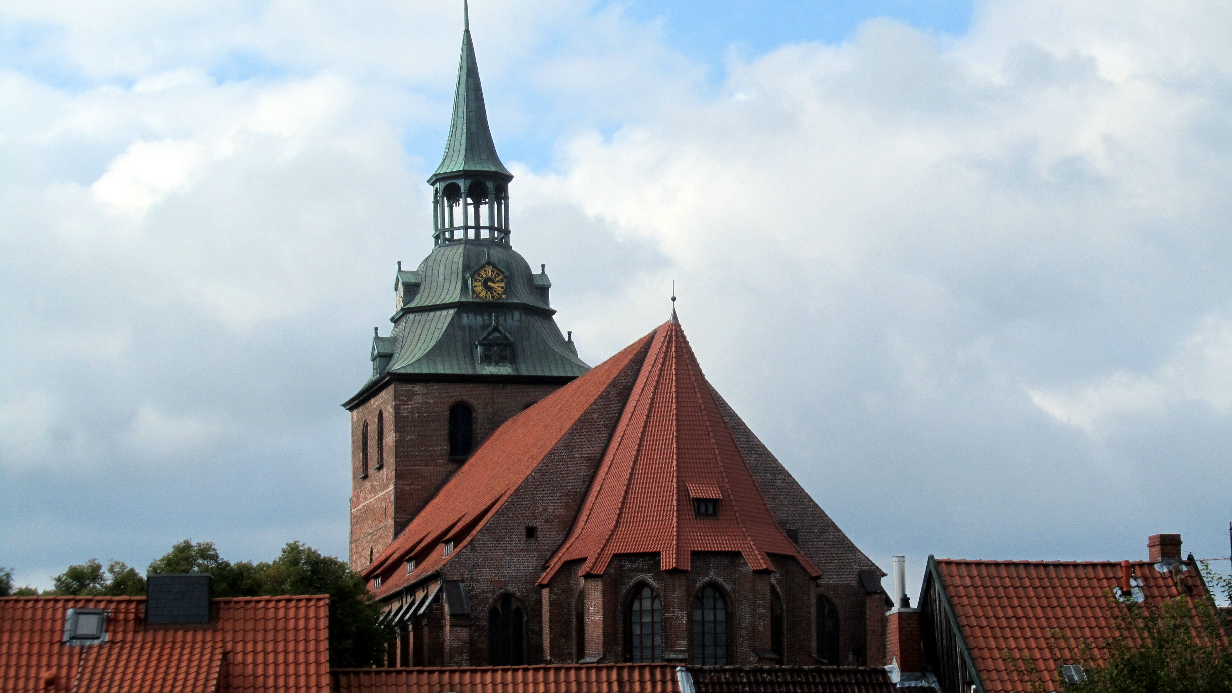 Michaeliskirche in der Lüneburger Altstadt